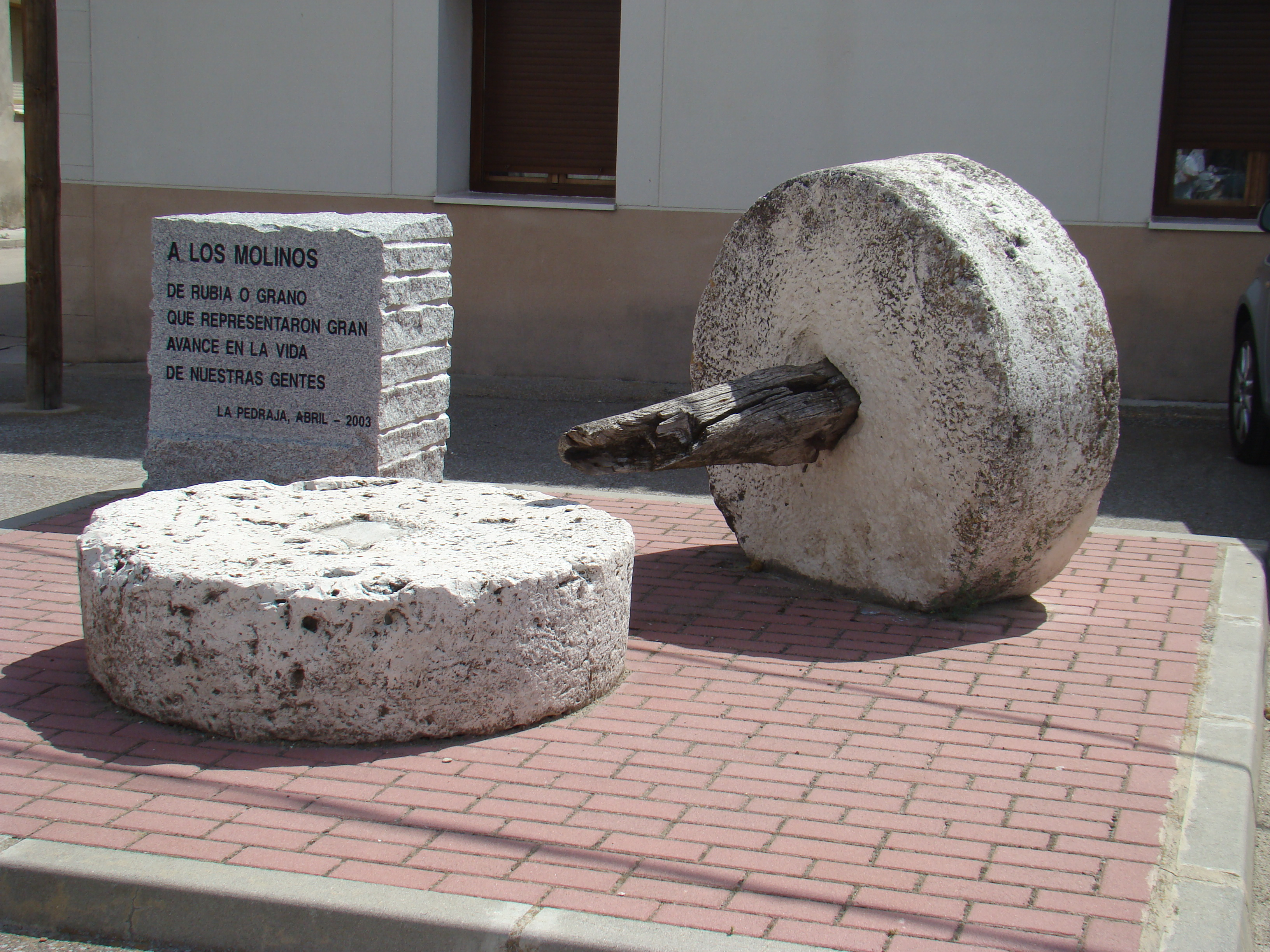 La Pedraja de Portillo en la provincia de Valladolid (España). Homenaje a los molinos de grano.